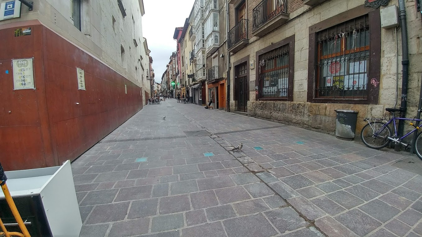 Gasteizko Aiztogile kalea